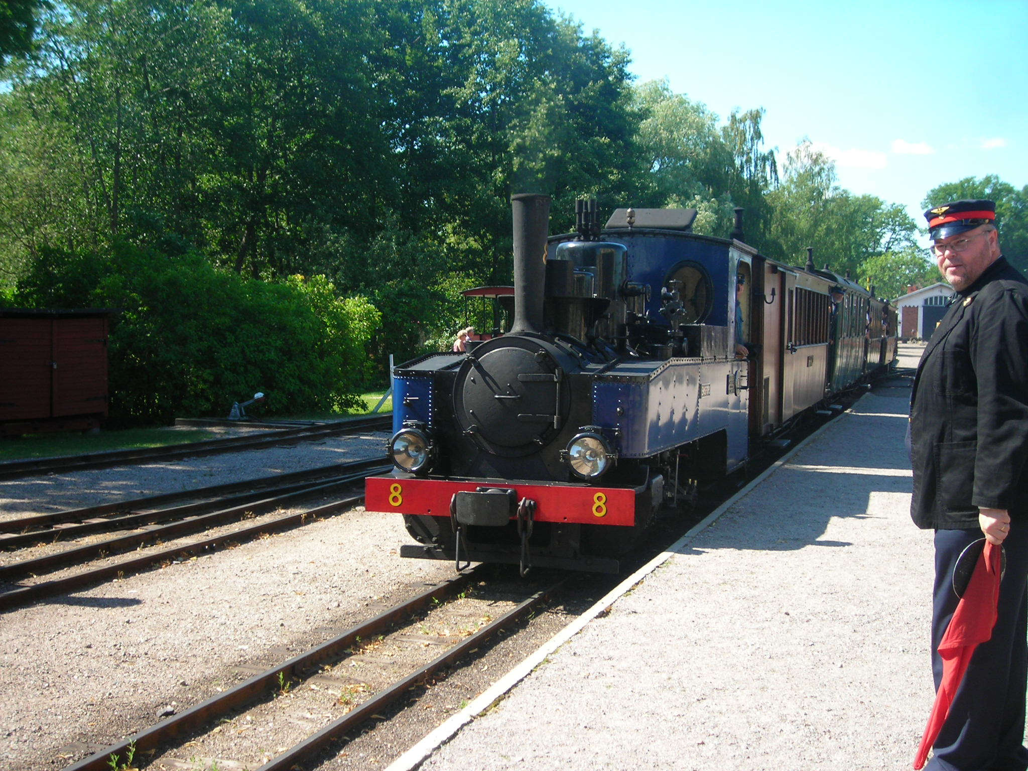 Emsfors Foto Daniel S.